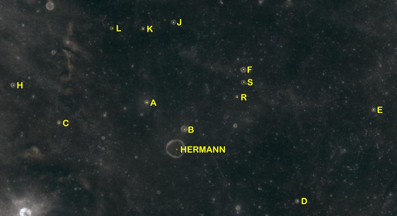 Cráter lunar Hermann. Cráteres satélite. (Imagen LROC)